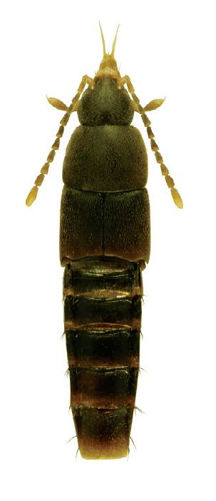 Myllaena kaskaskia